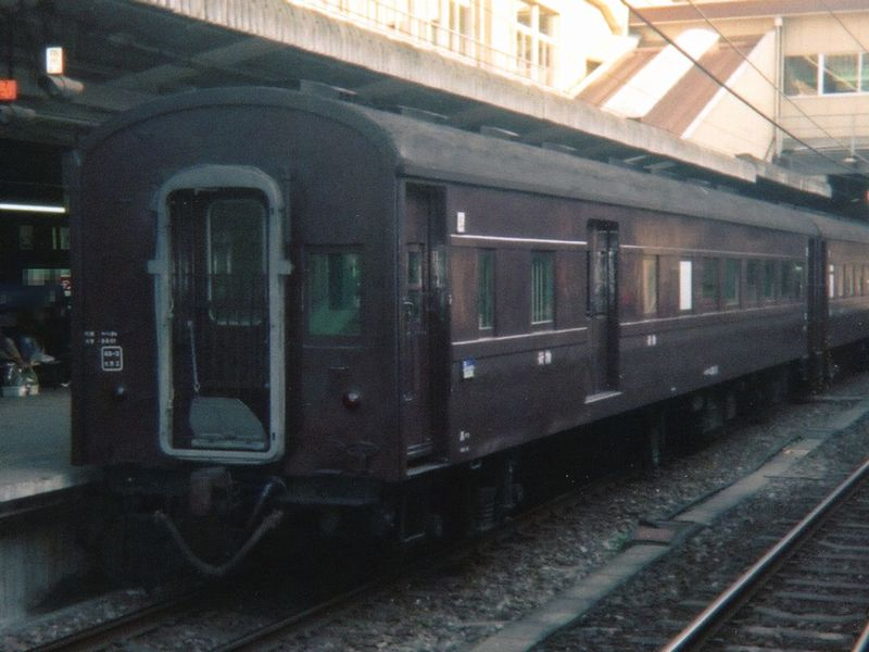 East Japan Railway Company , Passenger car type Ohani-36 at Takasaki Sta.